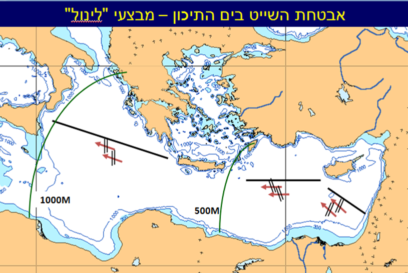 איזורי אבטחת השיט במזרח הים התיכון בתקופת מלחמת יום הכיפורים